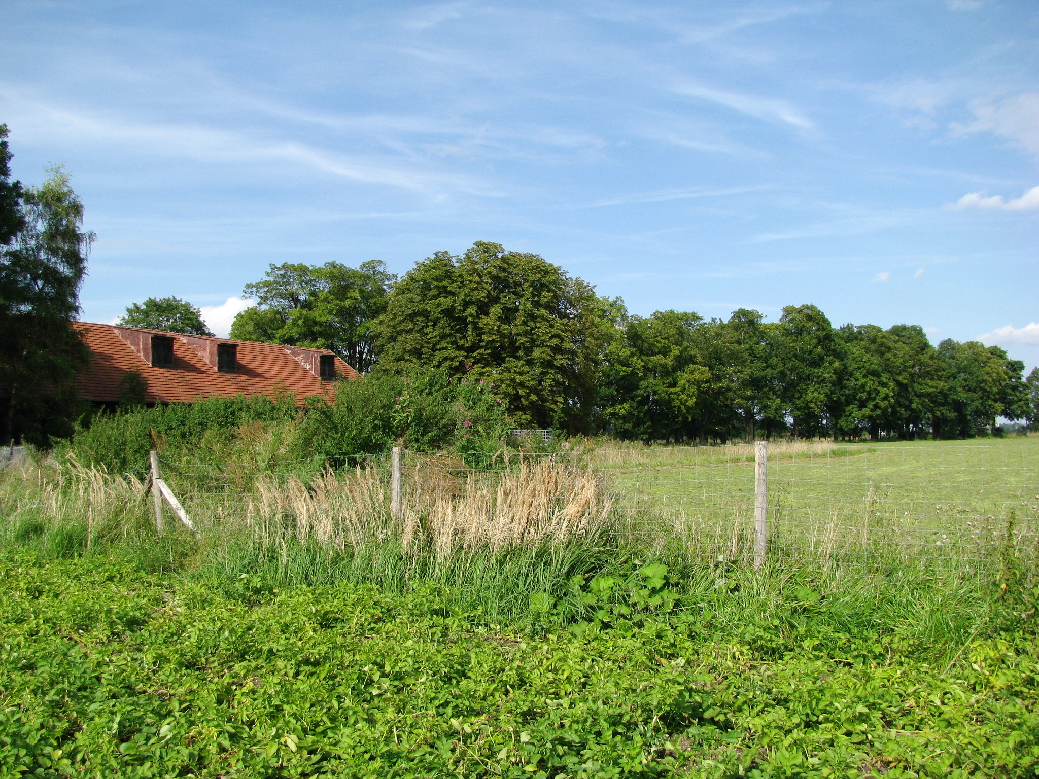 Gut Moosschwaige im Münchner Stadtteil Aubing; links ein Wirtschaftsgebäude, rechts die Allee des Zufahrtsweges